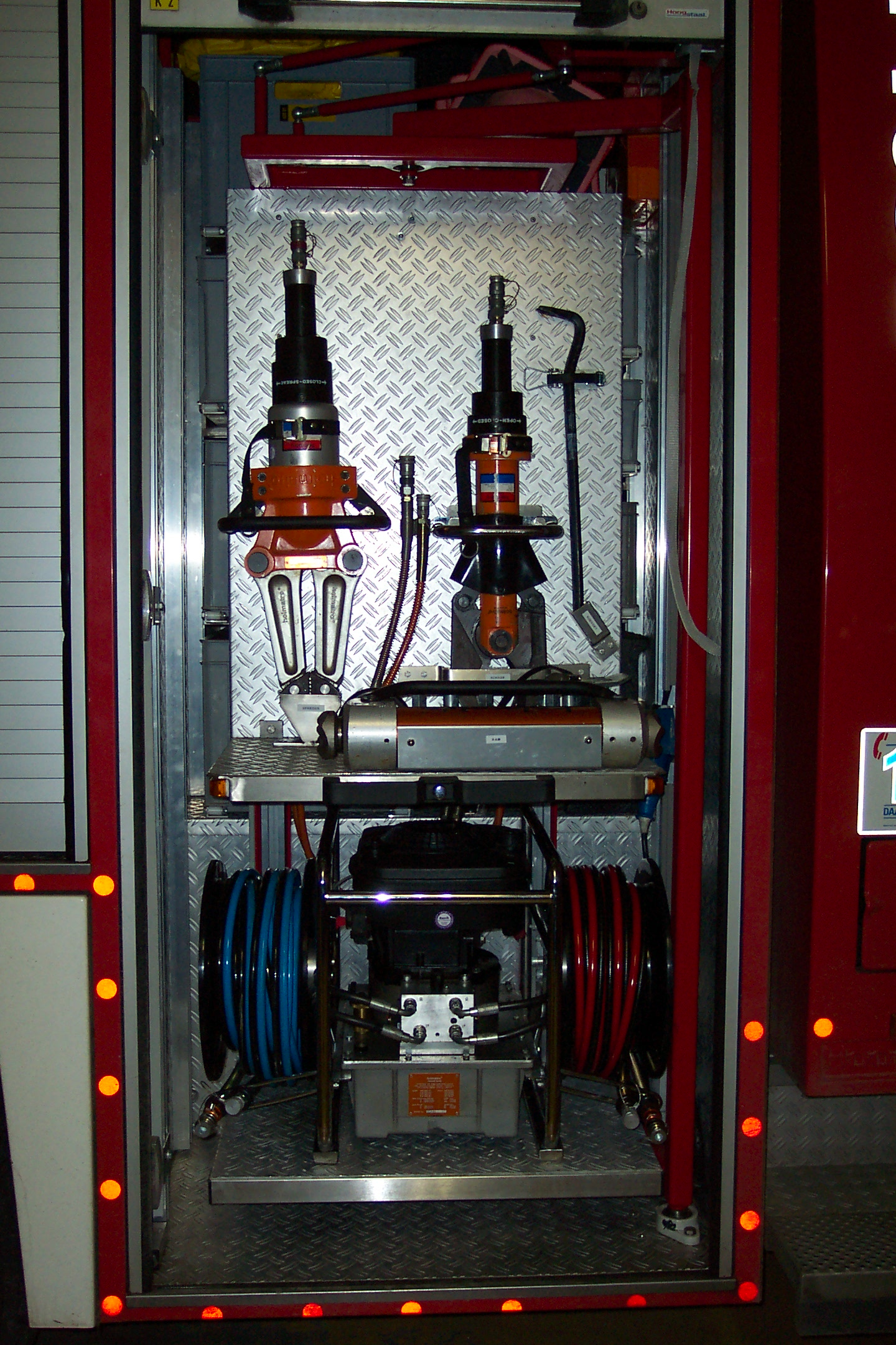 Redgereedschap